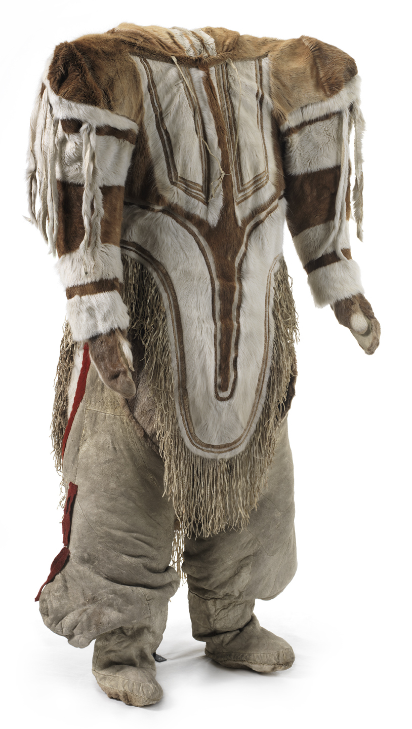 Pels af rensdyrskind med snipper for og bag. Frynserne hindrer kanten i at rulle op og varmen i at slippe ud. Ryggen har en stor hætte til at bære et barn i. Dekorative frynser på skuldrene. Bukser og støvler af rensdyrskind. Støvlerne har sideposer, som sandsynligvis blev brugt til at bære småting i. Fra Baker Lake, Eskimo Point og Hikoligjuaq, vest for Hudson Bay. Indsamlet på 5. Thule-ekspedition 1921-24. Parka of caribou skin with front and back flaps. The fringes prevent the edge from rolling up and loss of warmth. The back has a large hood for carrying a baby. Decorative fringes on the shoulders. Trousers and boots of caribou skin. The boots have side bags, probably for carrying small items. From Baker Lake, Eskimo Point and Hikoligjuaq, west of Hudson Bay. Collected on 5th Thule Expedition, 1921-1924. Foto: Roberto Fortuna